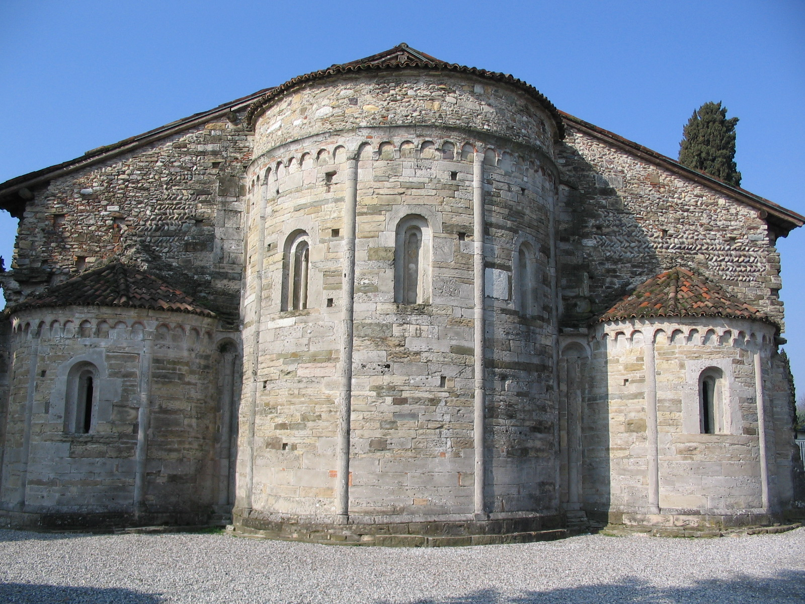 Basilica di Santa Giulia, abside superstite, nel comune di Bonate Sotto.